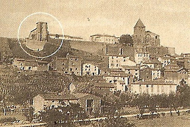 Chanteuges von NW, altes_Foto_vor_1896